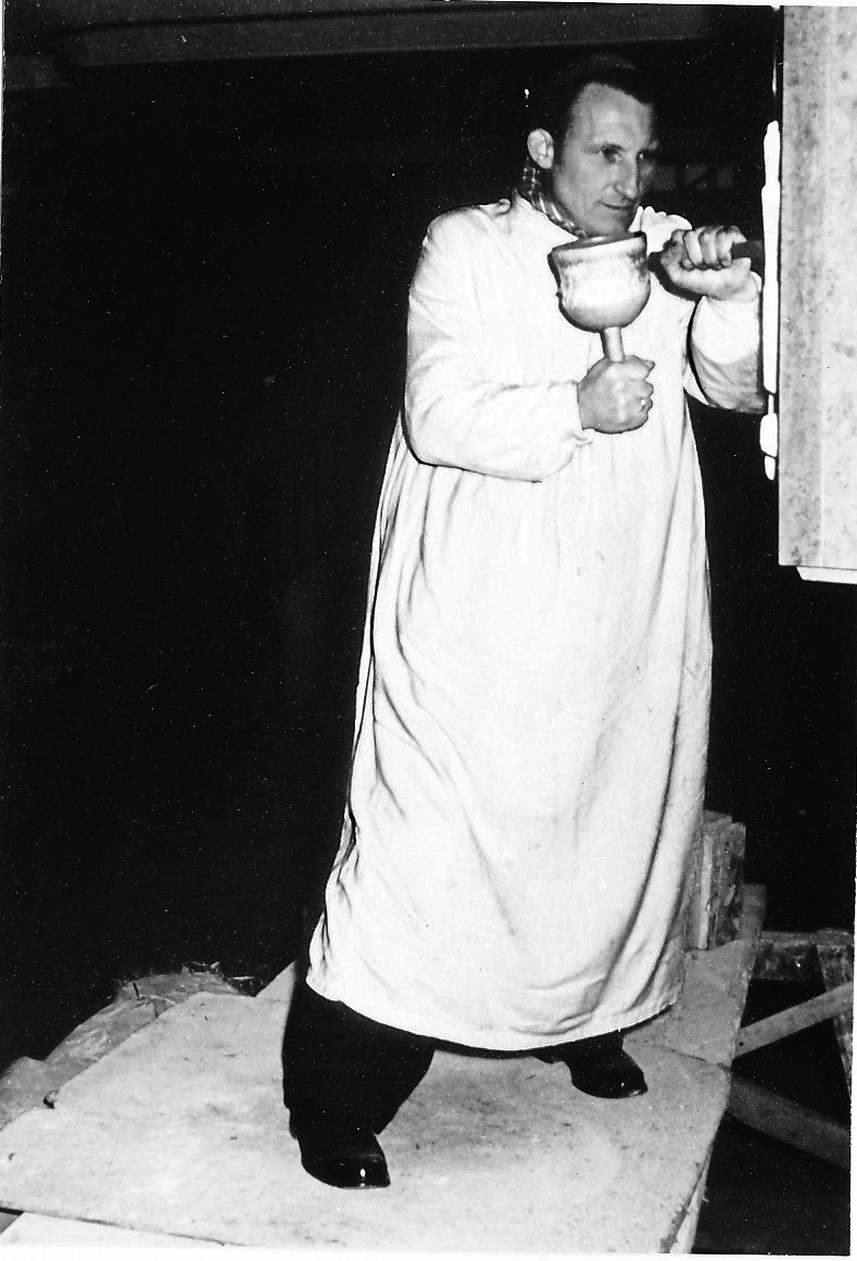 Wilhelm Freiherr von Rechenberg bei seiner Arbeit